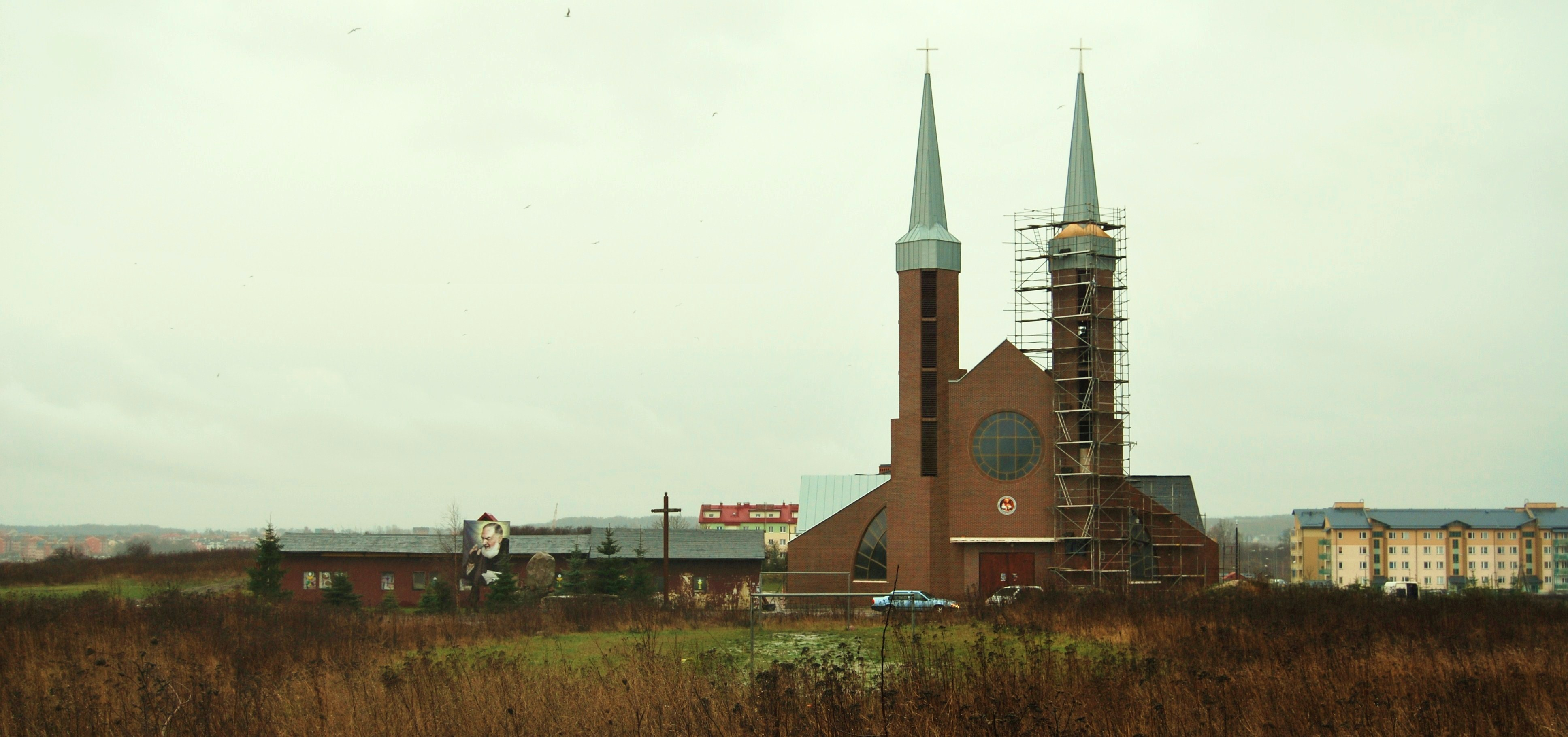 Parafia świętego Ojca Pio w Gdańsku (Ujeścisku). Budowa Kościoła; grudzień 2009 r.